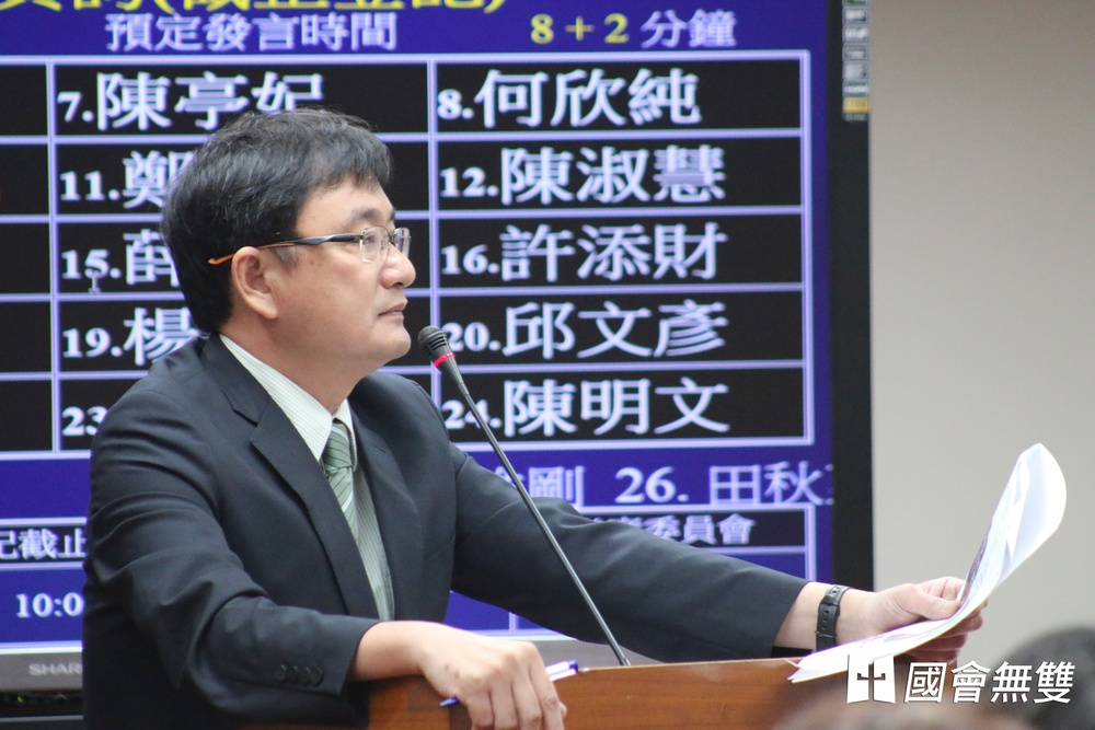 中文（台灣）: 民進黨立委黃國書指出，他協助台中市政府向文化部申請活動補助，幾個月來沒有下文，執政黨立委幫忙協調的補助案卻迅速通過，質疑文化部有差別待遇。